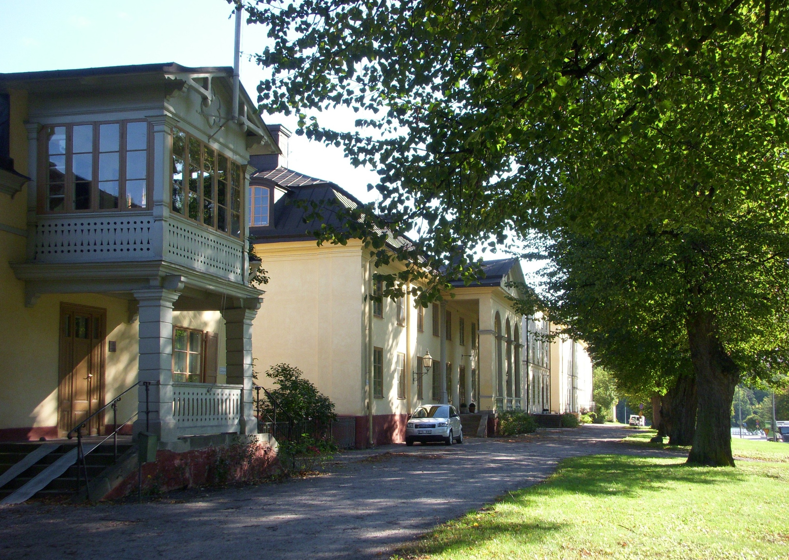 Drottningholmsmalmen, Långa raden med "Inspektorbostaden" och "Kanslihuset", september 2011